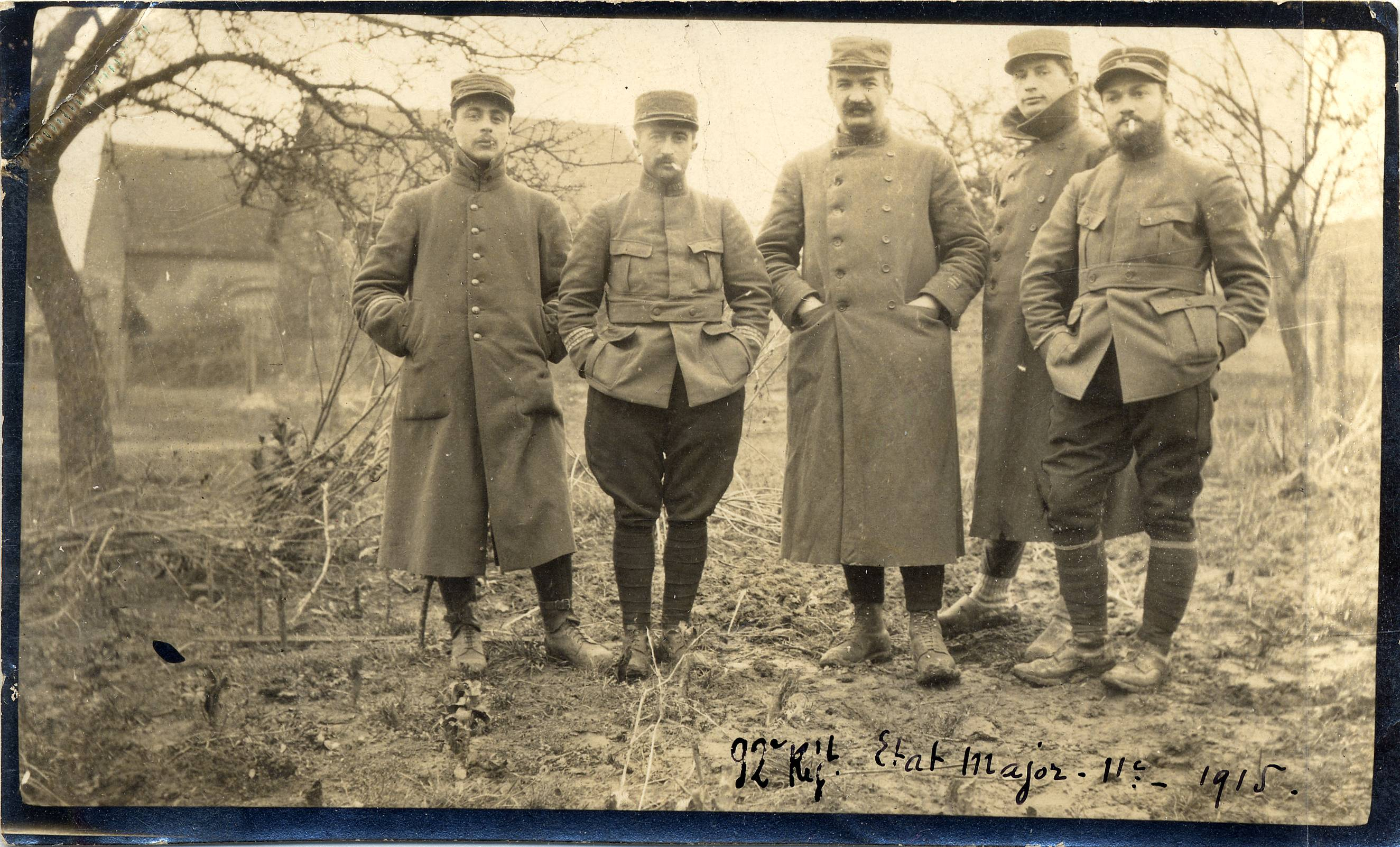 Photo d'un groupe de cinq officiers du 92e régiment. 1915. Guerre 1914-1918.